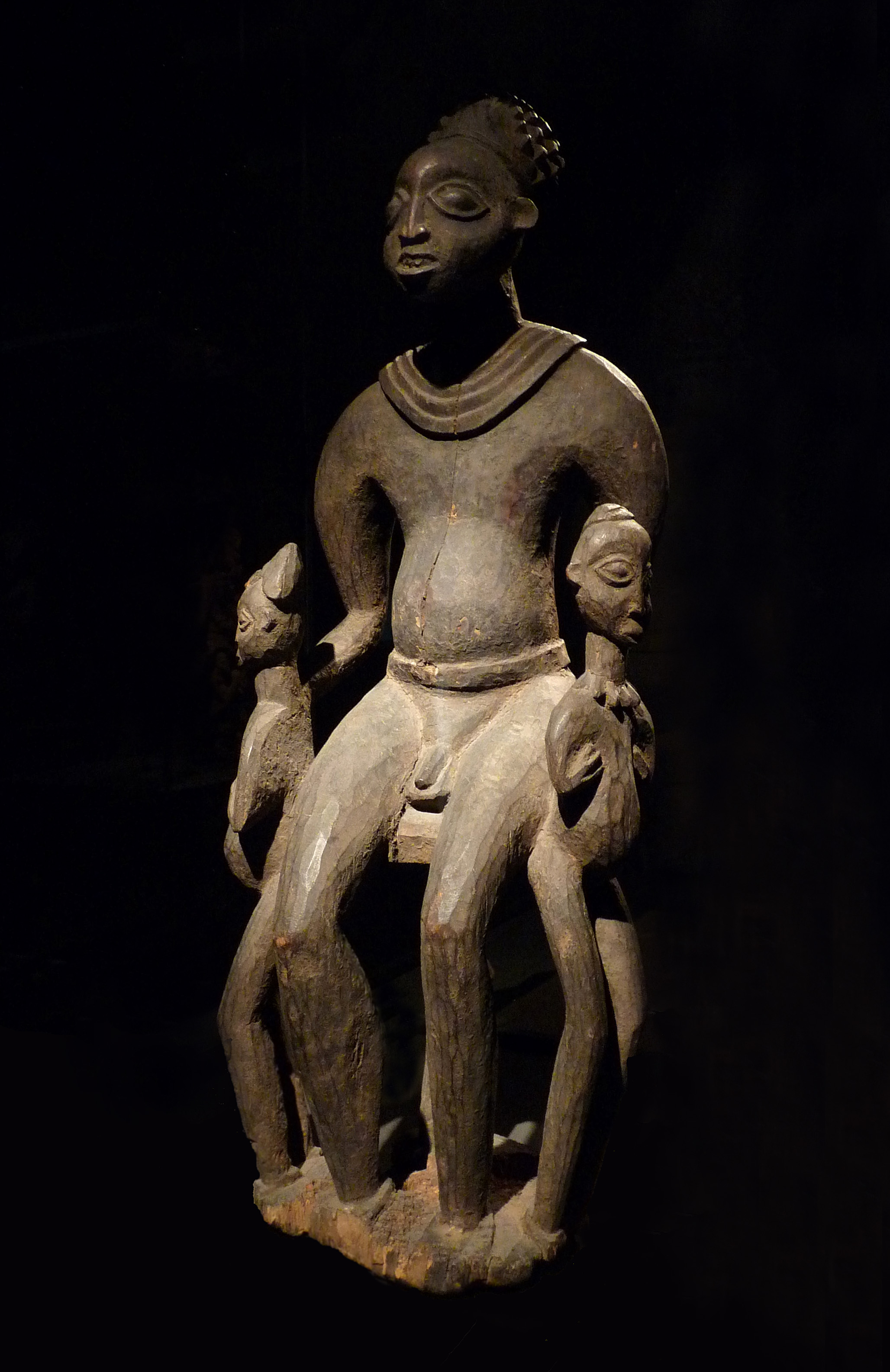 Figure masculine avec jumeaux. Cameroun, Bangwa. Bois. 89 cm. 19e siècle (Musée ethnologique de Berlin) (cf. Hans-Joachim Koloss (dir.), « Männliche Figur mit Zwillingen », in Afrika. Kunst und Kultur. Meisterwerke afrikanischer Kunst. Museum für Völkerkunde Berlin, Prestel, München, London, New York, 1999, p. 211)